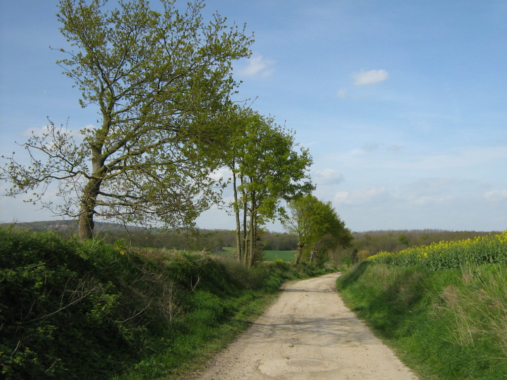 Sentier situé au Nord de Génicourt, à proximité de la forêt séparant Génicourt et Livilliers.